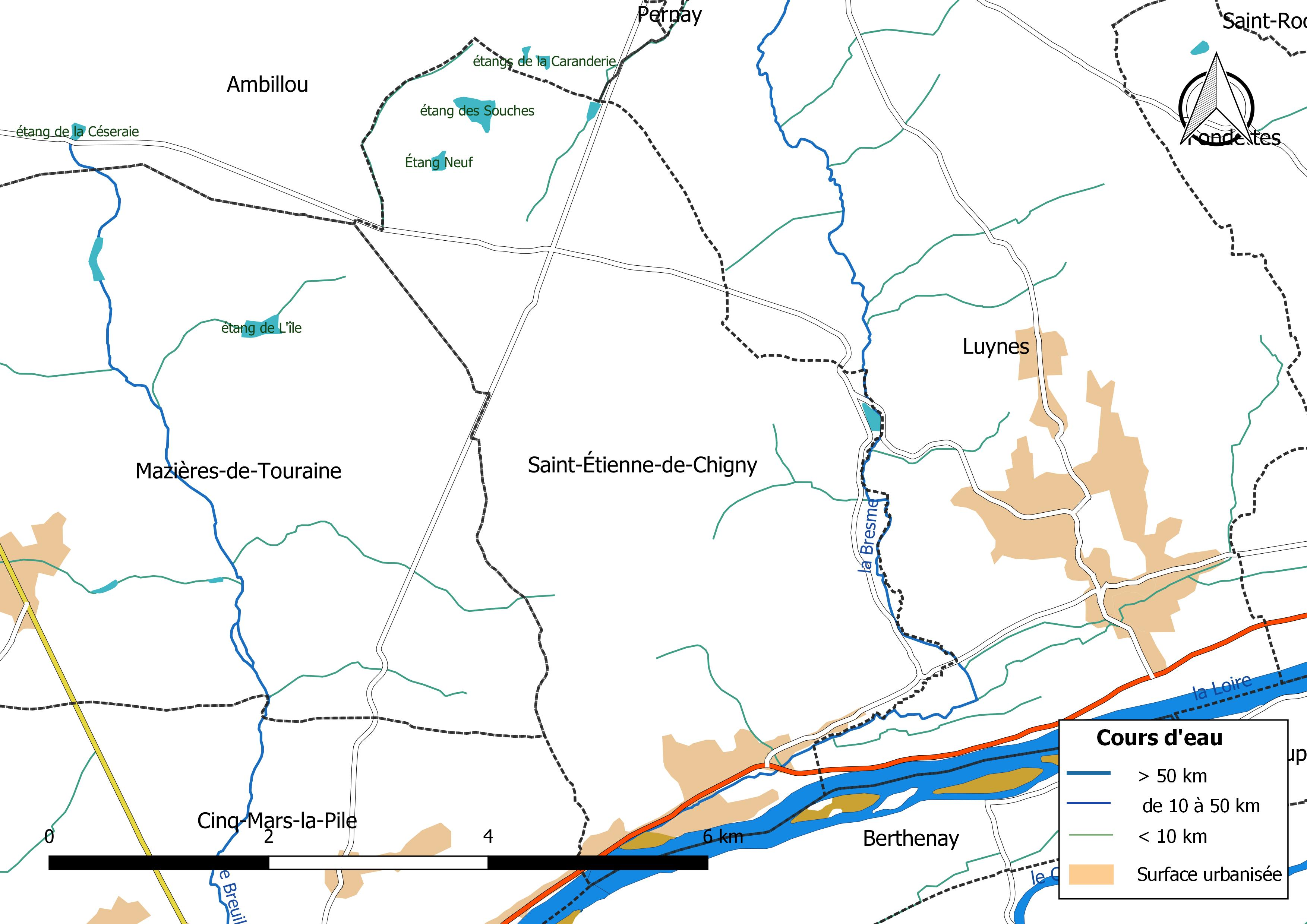 Carte du réseau hydrographique de la commune de Saint-Étienne-de-Chigny (France).